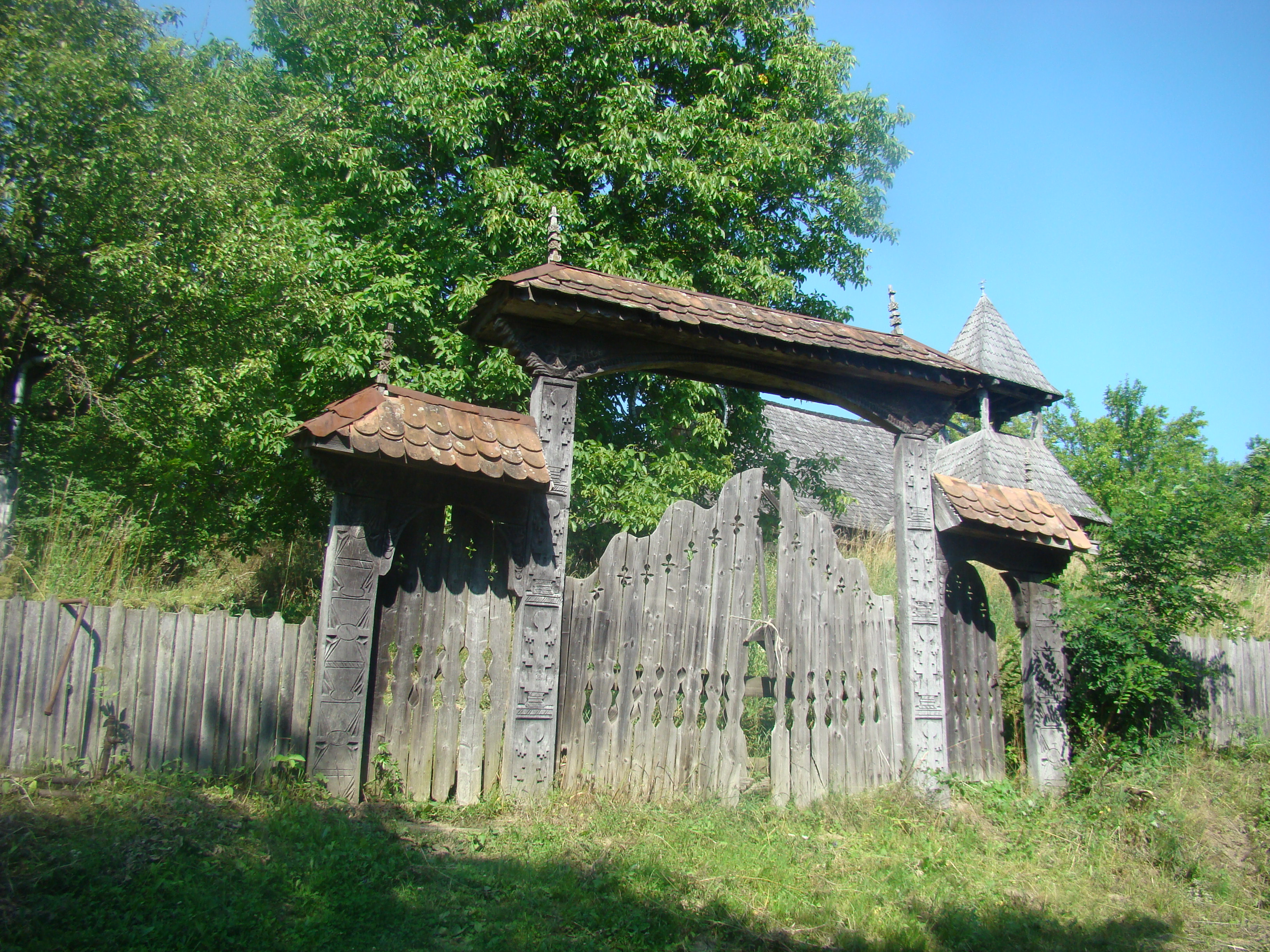 Biserica de lemn „Sfinții Arhangheli” din Băița, Mureș